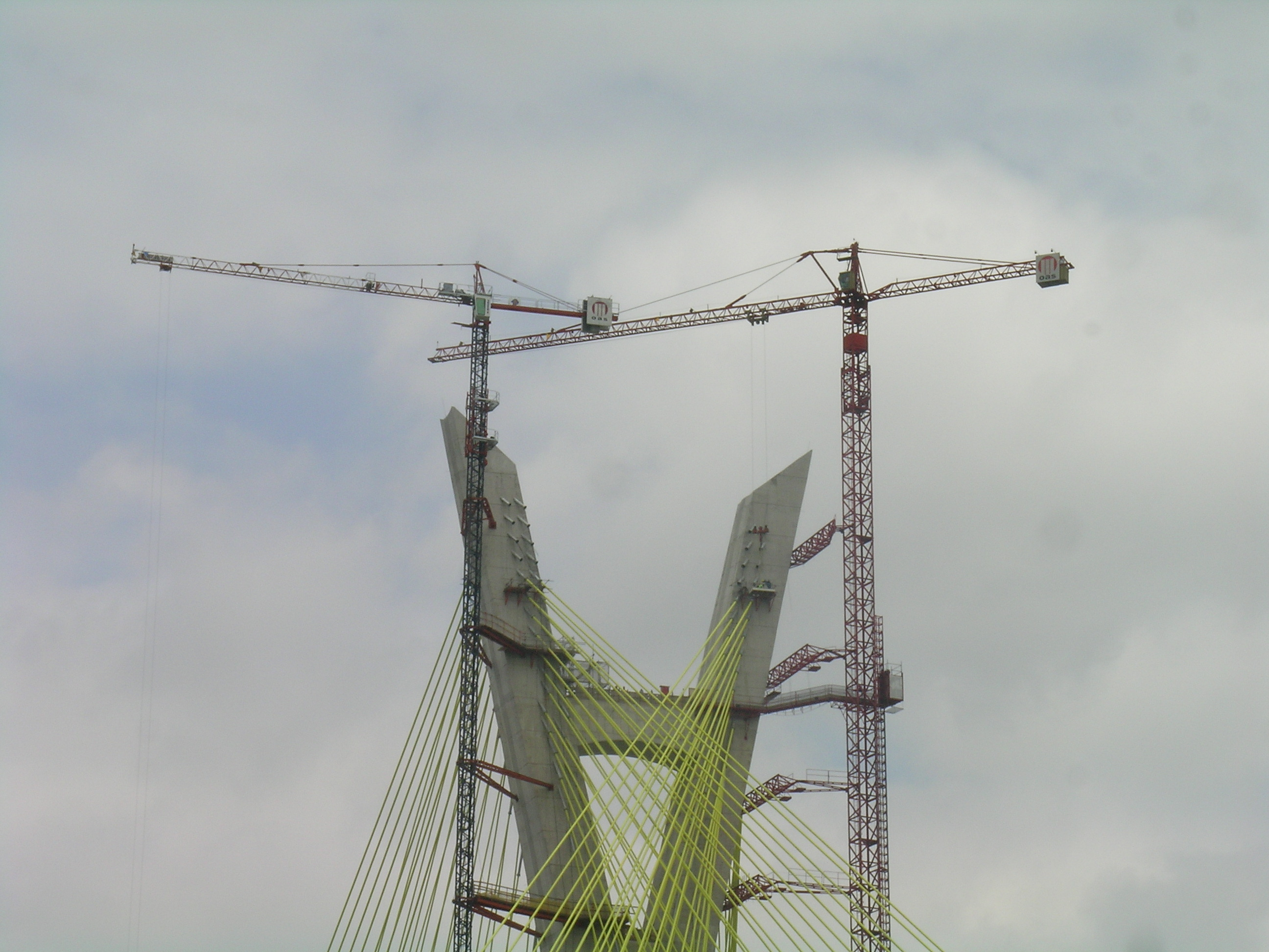 Ponte Estaiada Octavio Frias de Oliveria - Mastro. Under construction cable-stayed bridge.